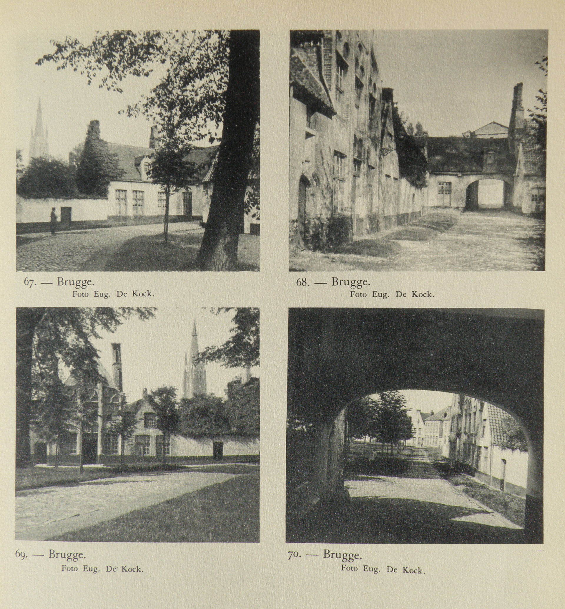 Brugge. Begijnhof, foto's uit 1931. Gescand van: De begijnhoven, Stan Leurs, Jozef Van Mierlo, L. J. M. Philippen & A. Stefens, reeks Steden en landschappen, De Sikkel, 1931.